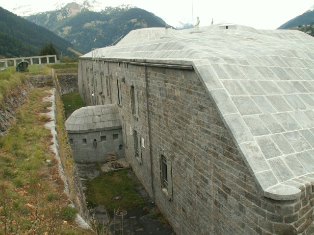 Kaponniere der Festung Airolo